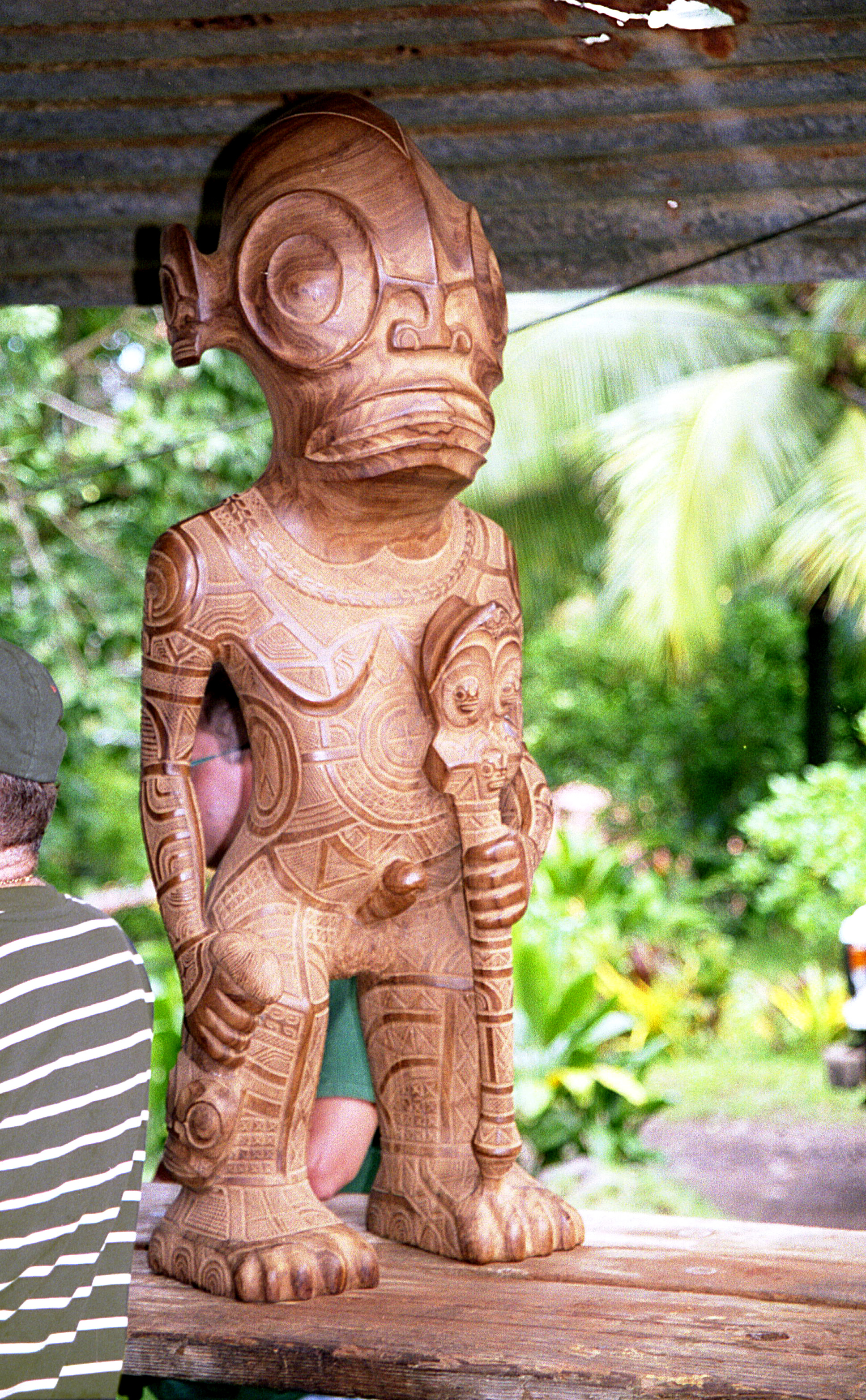 tiki en bois dans les iles marquises